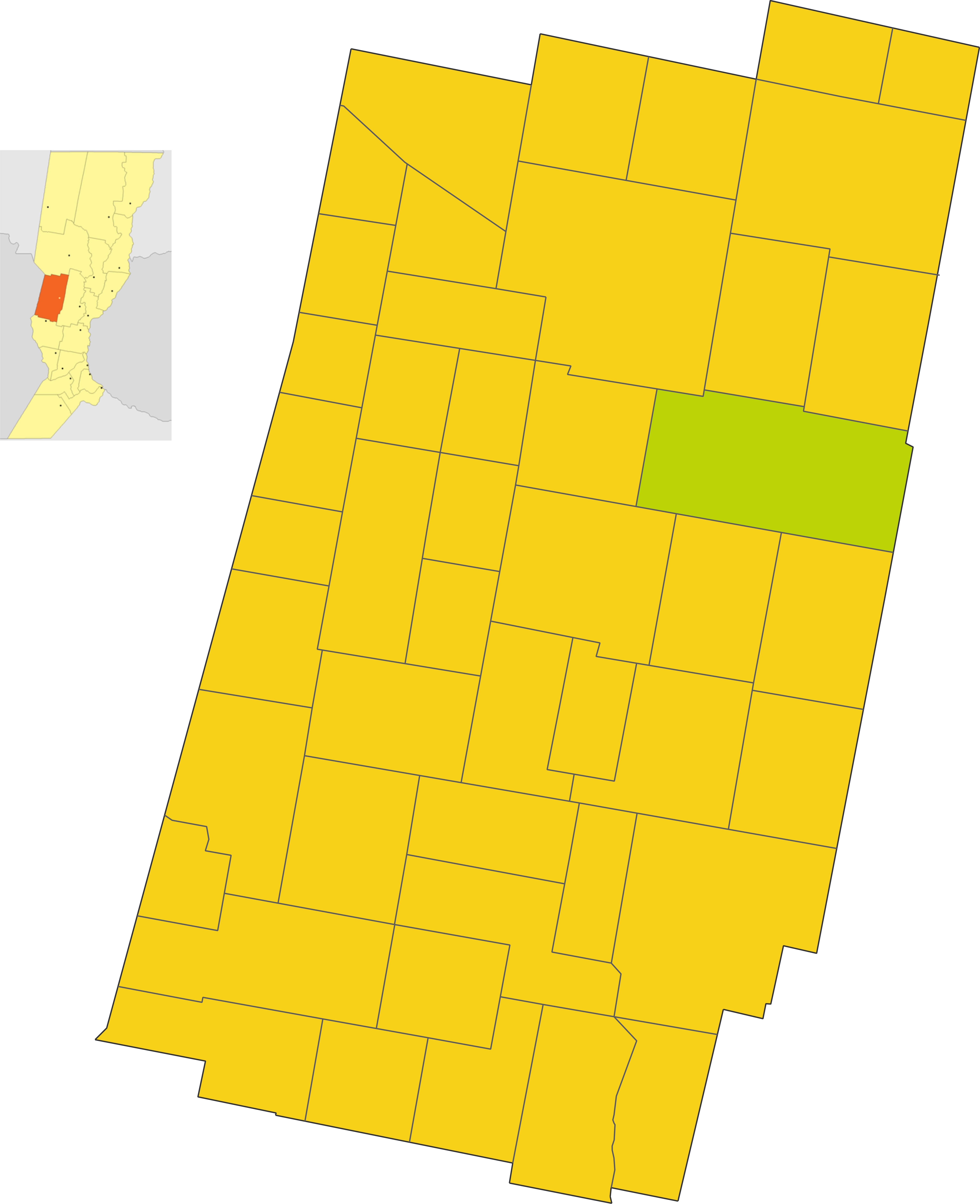 Map of the comuna de Lehmann in Castellanos department, Santa Fe province, Argentina